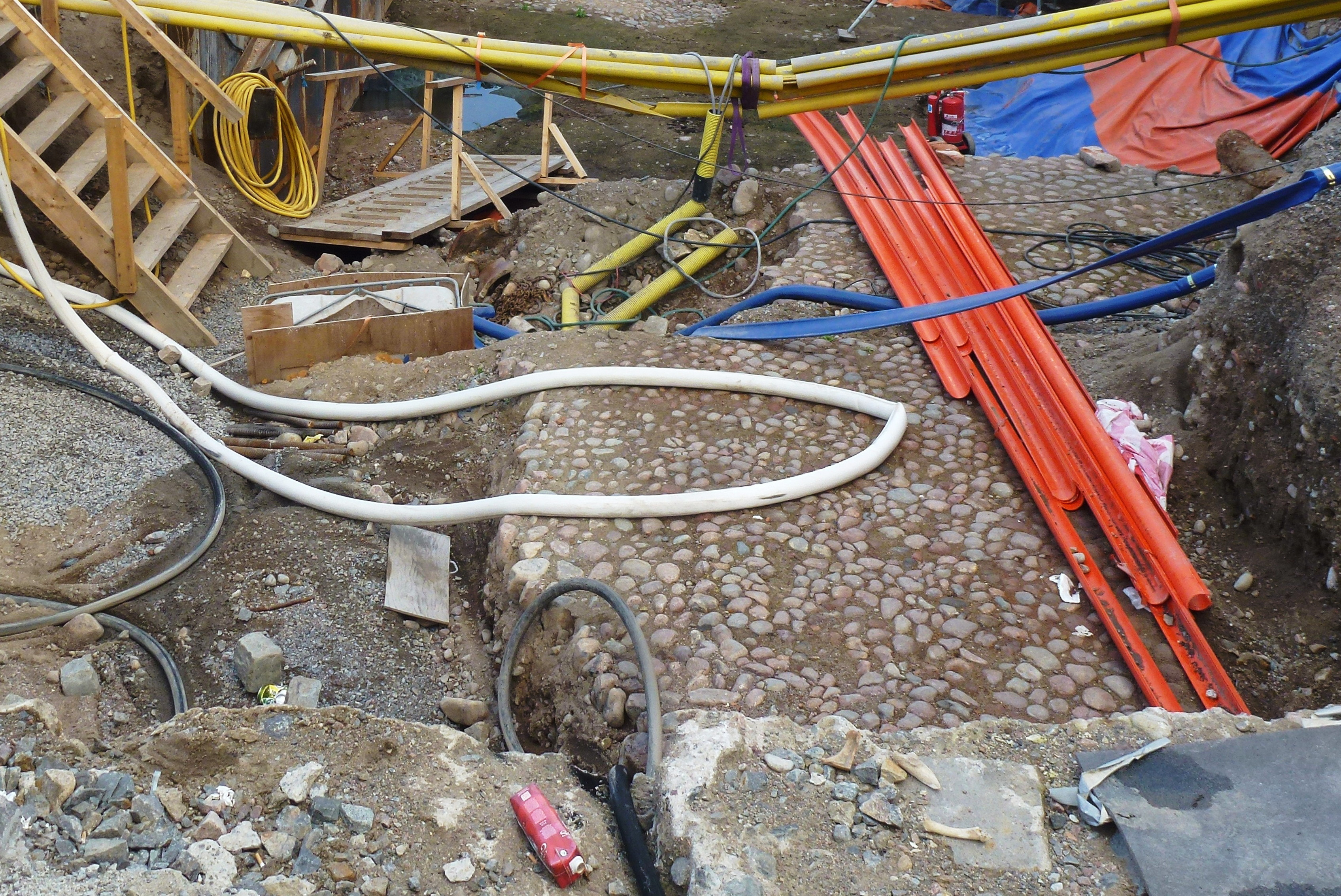 Södermalmstorg, utgrävning, kullersten från 1700-talet